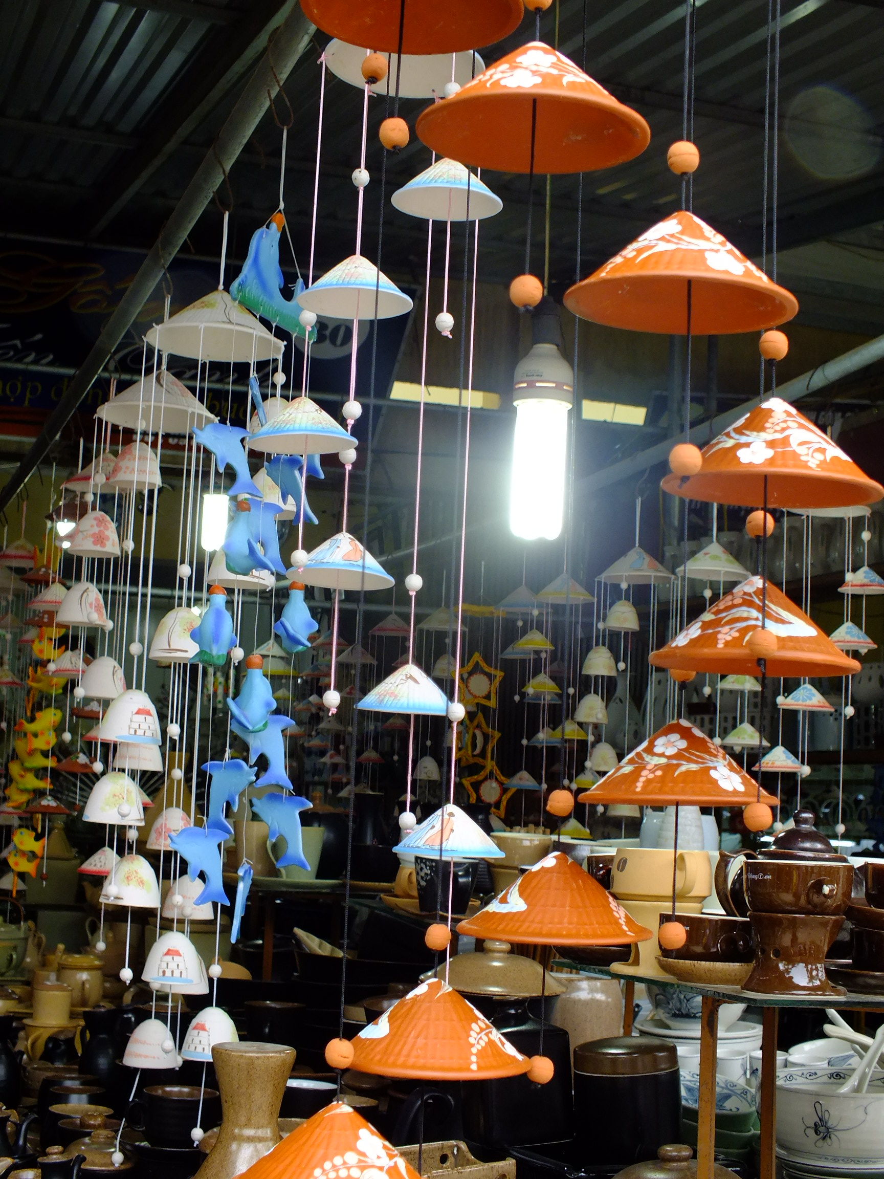 Xã Bát Tràng、 鉢塲社 バチャン村